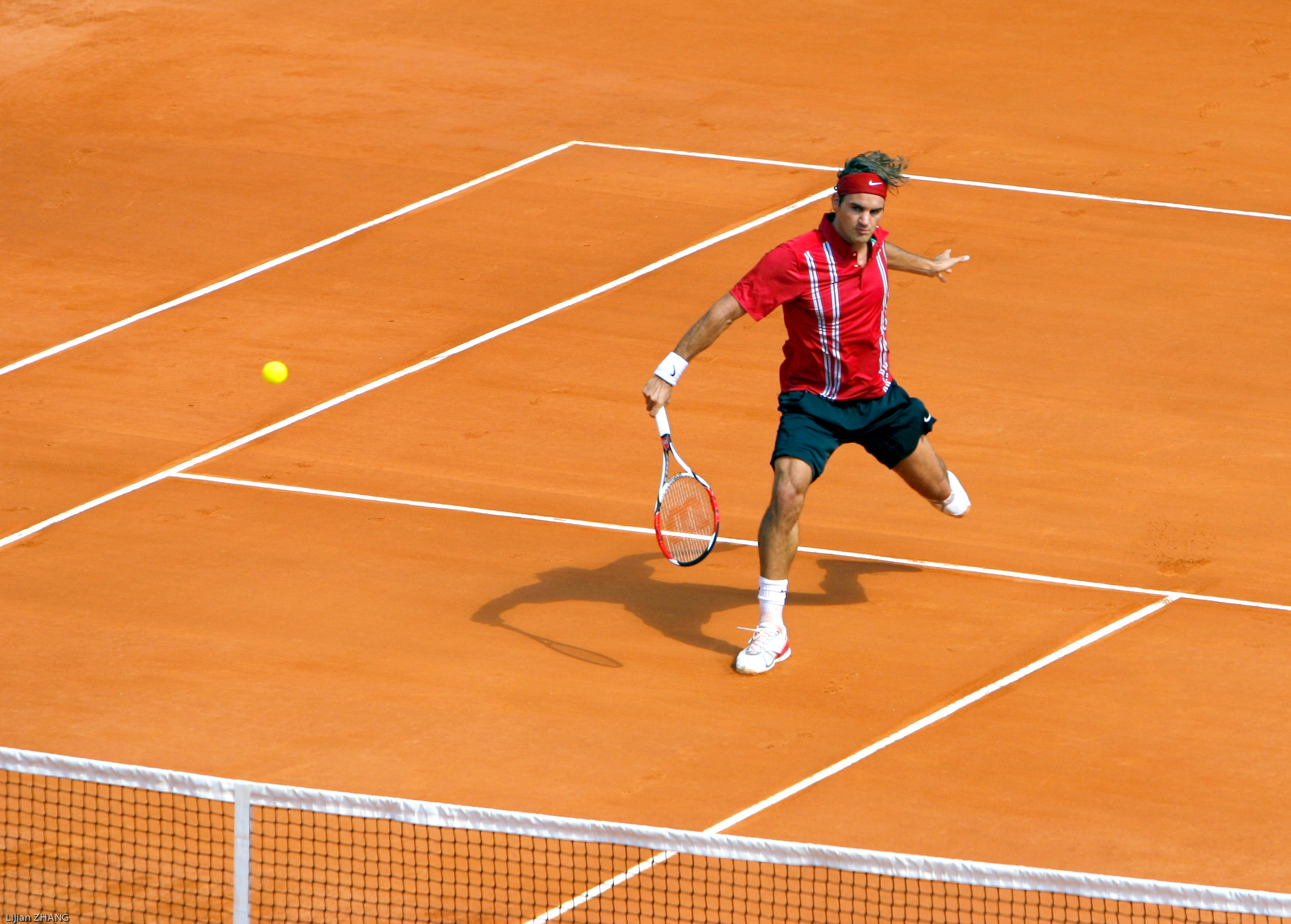 Roger Federer, Master Series Monte Carlo 2007